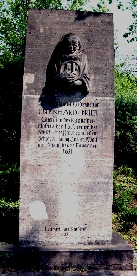 Gedenkstein für Pater Bernhard v. Trier, den mutigen Retter von Aschaffenburg v.Otto Gentil 1935